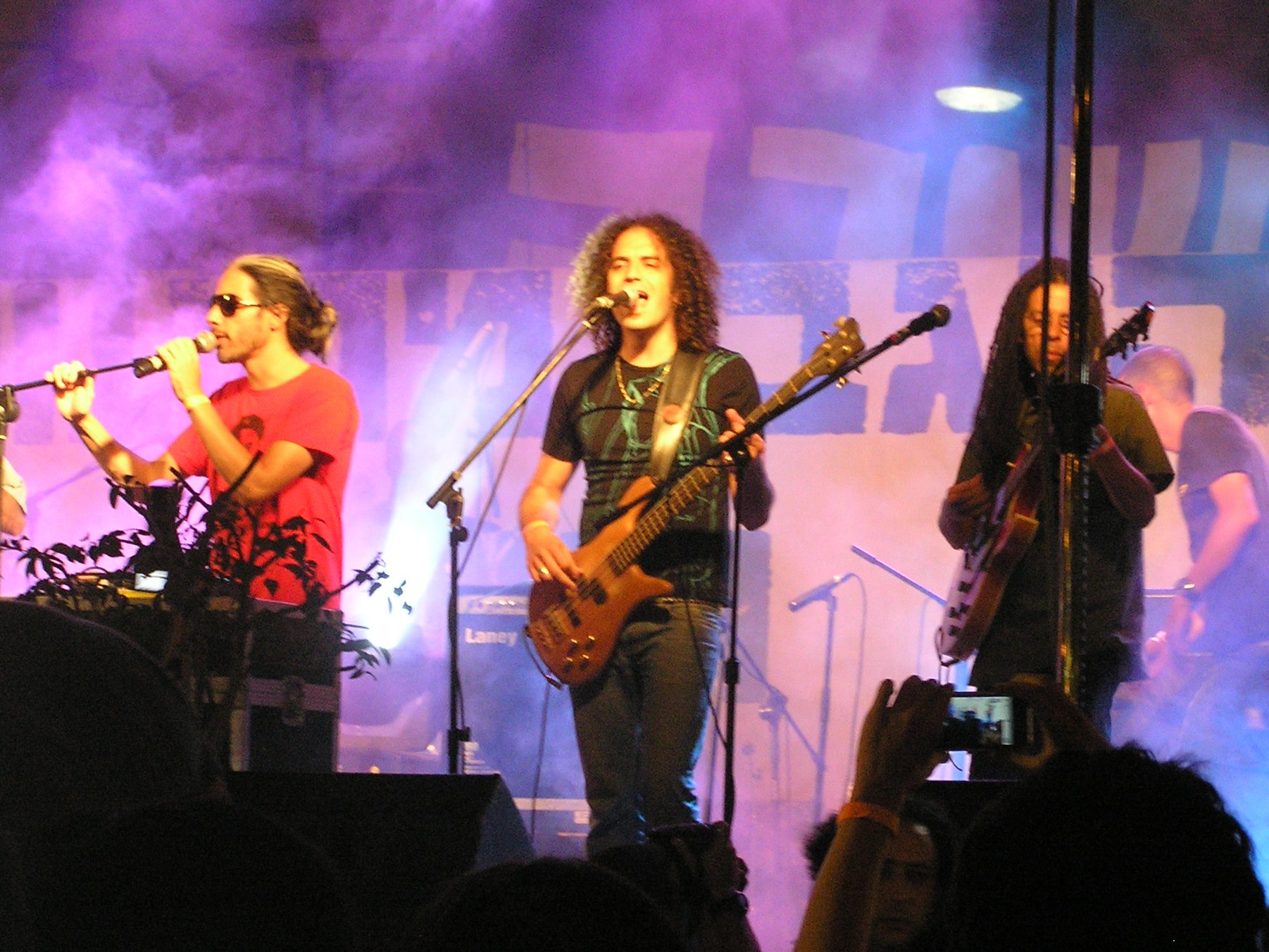 הדג נחש בעצרת "הנגד דורש צדק חברתי" בבאר שבע